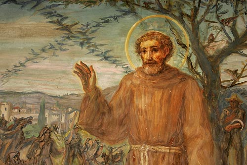 Mesocco: Chiesa San Rocco (Wandmalerei)